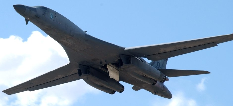 Boeing B-1B Lancer (USAF)